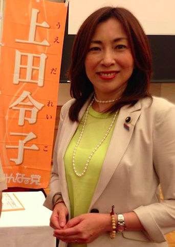 上田令子議員の都政報告会での一枚